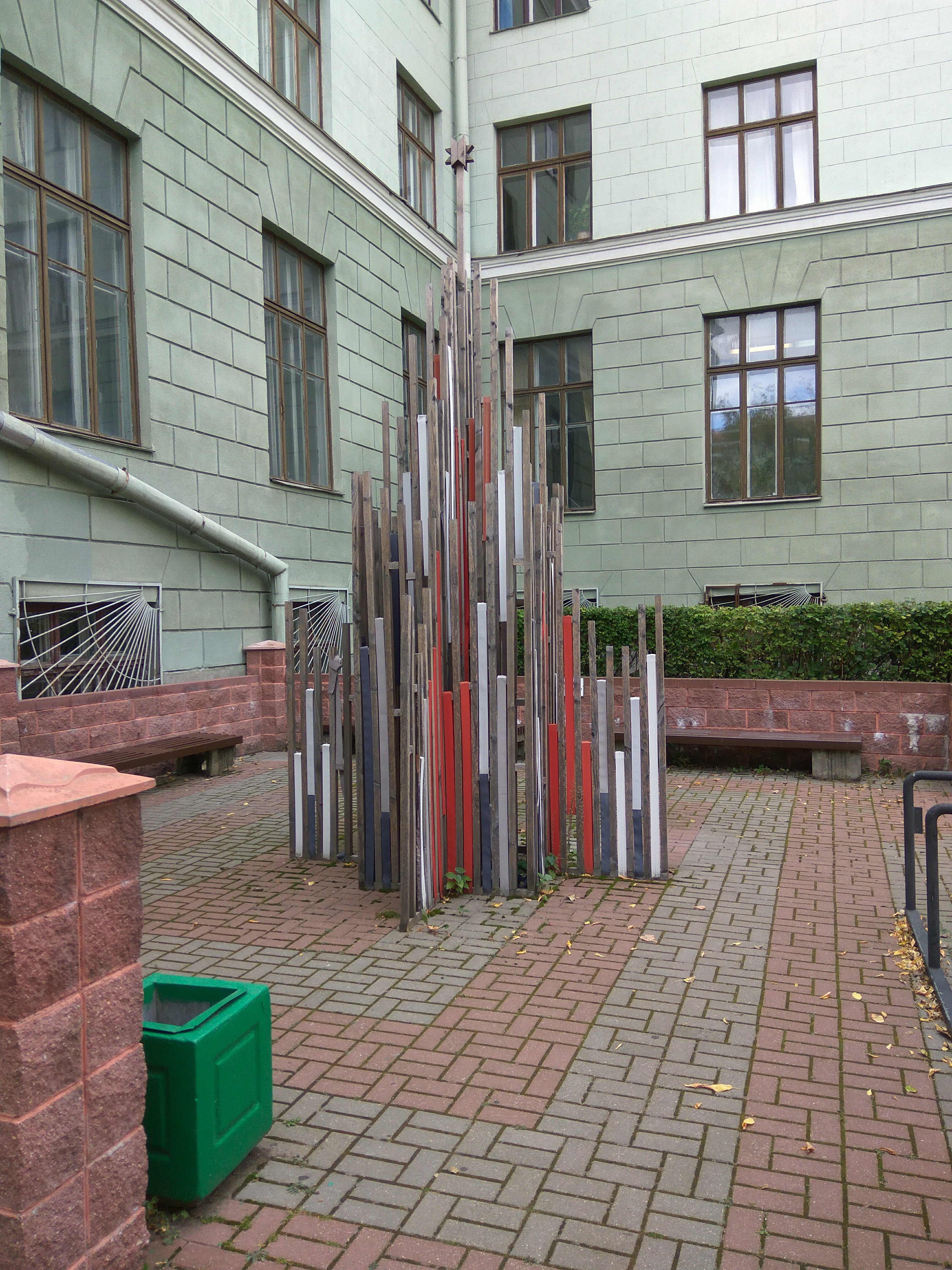 Мінск. Архітэктурны факультэт БНТУ